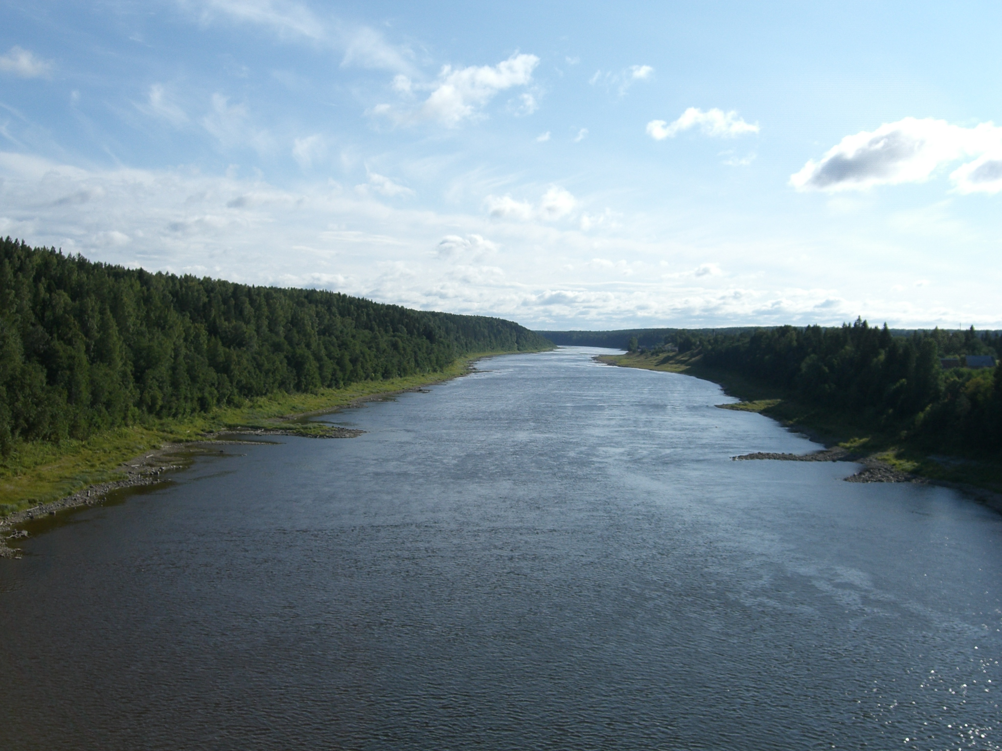 Suchona zwischen Totjma und Weliki Ustjug.